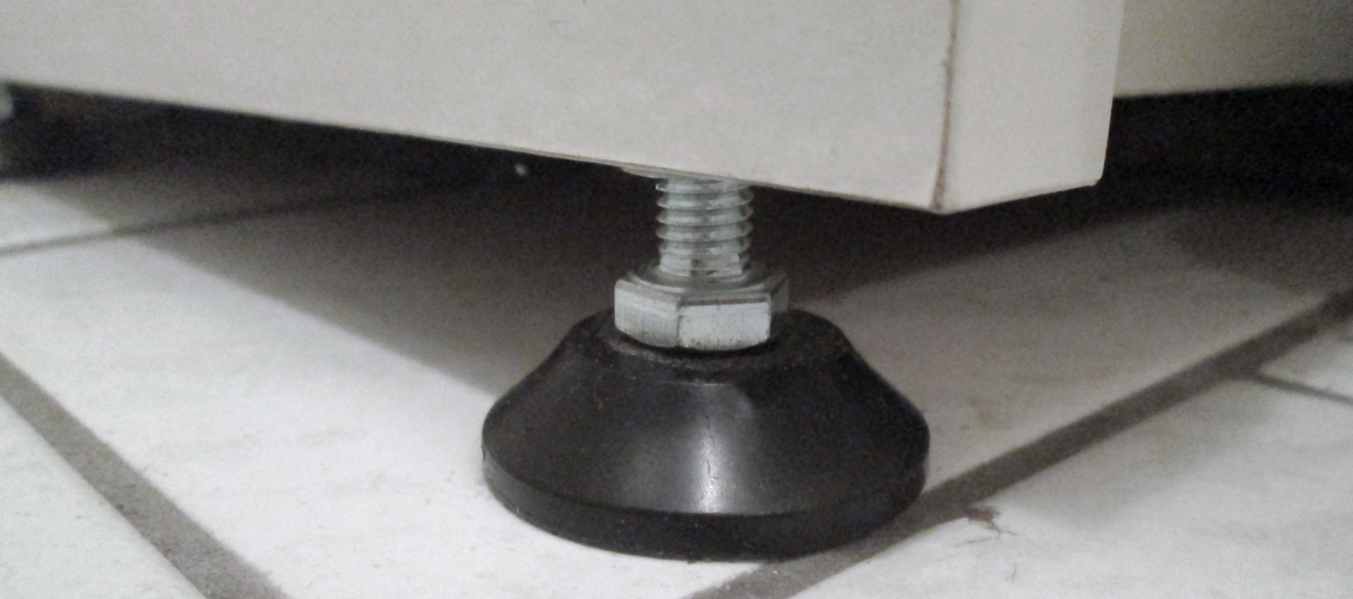 Stellteller/Standfuß/Stellfuß unter einem Schrank